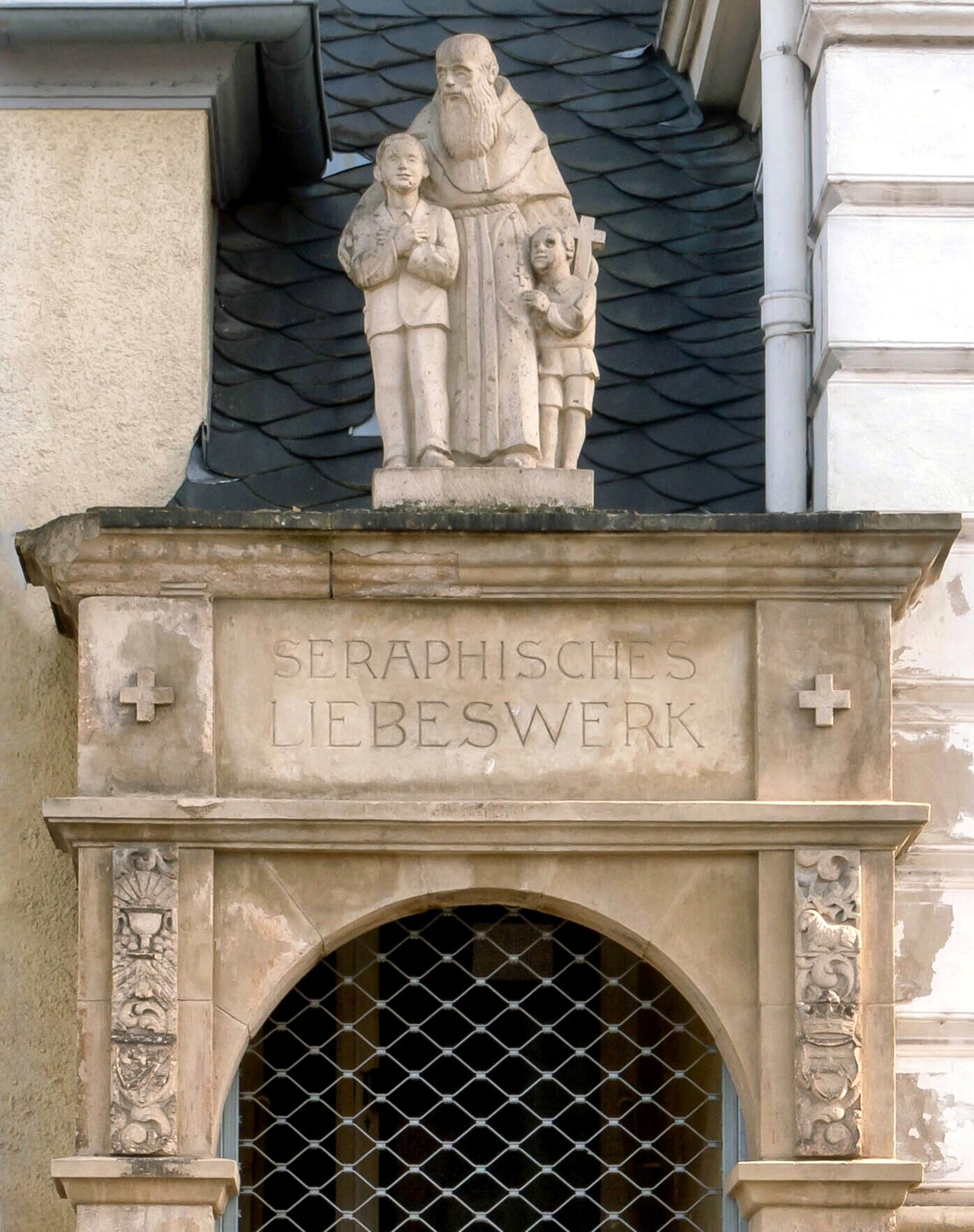 Portal am Kapuzinerkloster in Ehrenbreitstein, dem Sitz der Norddeutschen Abteilung des Seraphischen Liebeswerkes bis 2001, seitdem in Koblenz-Arenberg.